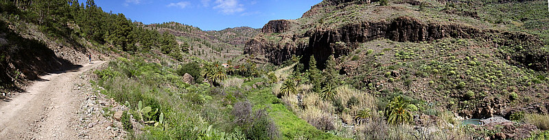 Bildbeschreibung: Gran Canaraia, Weg zwischen Ayagaures und San Bartolomé // Barranco de Ayagaures, San bartolomé de Tirajana (Gran Canaria) Quelle: selbst fotografiert Fotograf/Zeichner: --Eckhard Jakob 13:52, 16. Jan 2006 (CET) Datum: 2006-02-01 andere Versionen: hohe Auflösung auf Anfrage